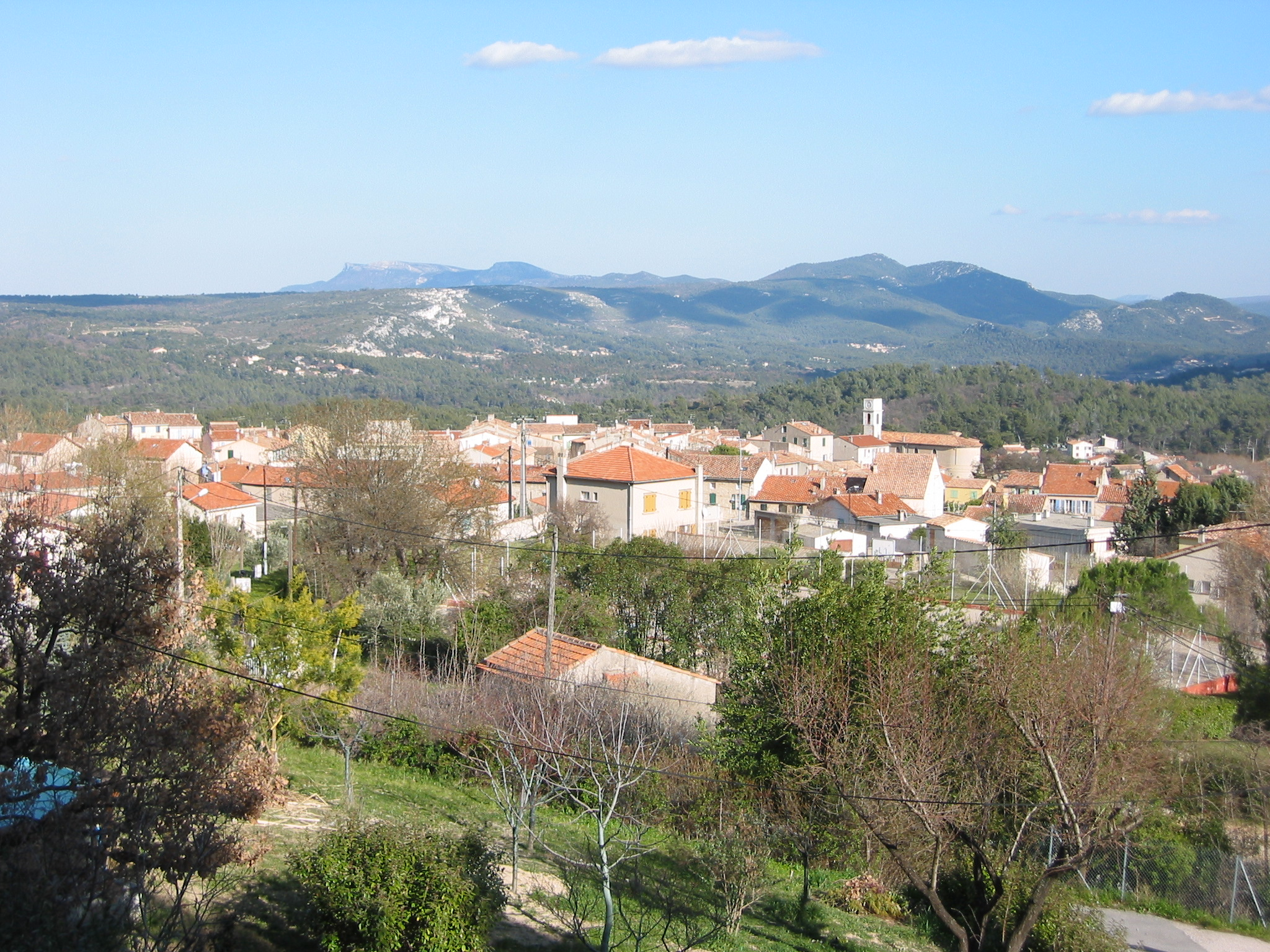 Cadolive, Bouches-du-Rhône, France. Photo prise depuis le chemin de Galice, côté Mont Julien. Photo prise le 1er mars 2006. Auteur : Ludovic Ruat (utilisateur:civodule)